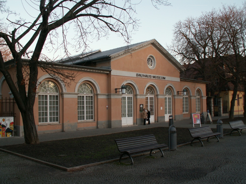 Bauhaus-Museum in Weimar